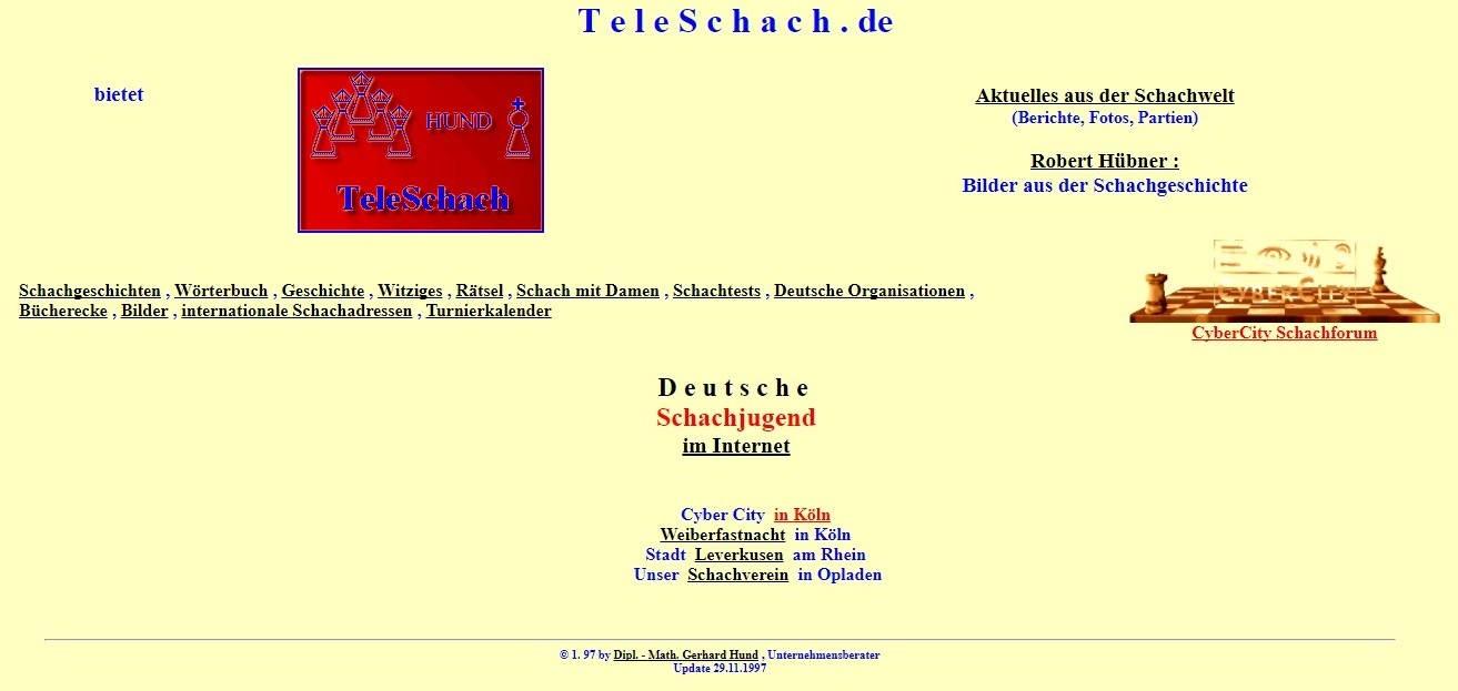 Die Webseite aus dem Jahr 1997 des Internetportals TeleSchach.